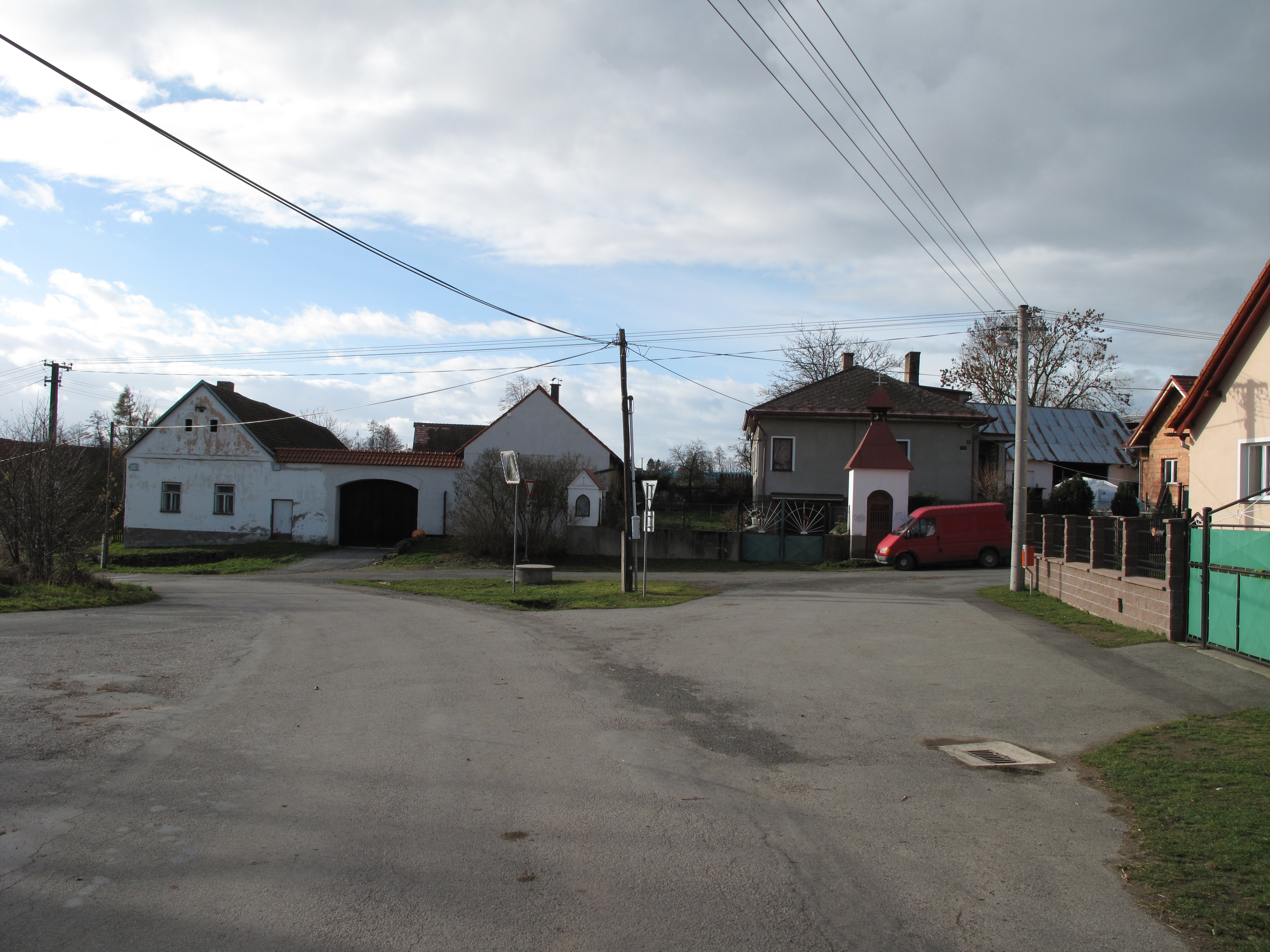 Náves v Mitrovicích. Okres Benešov, Česká republika.